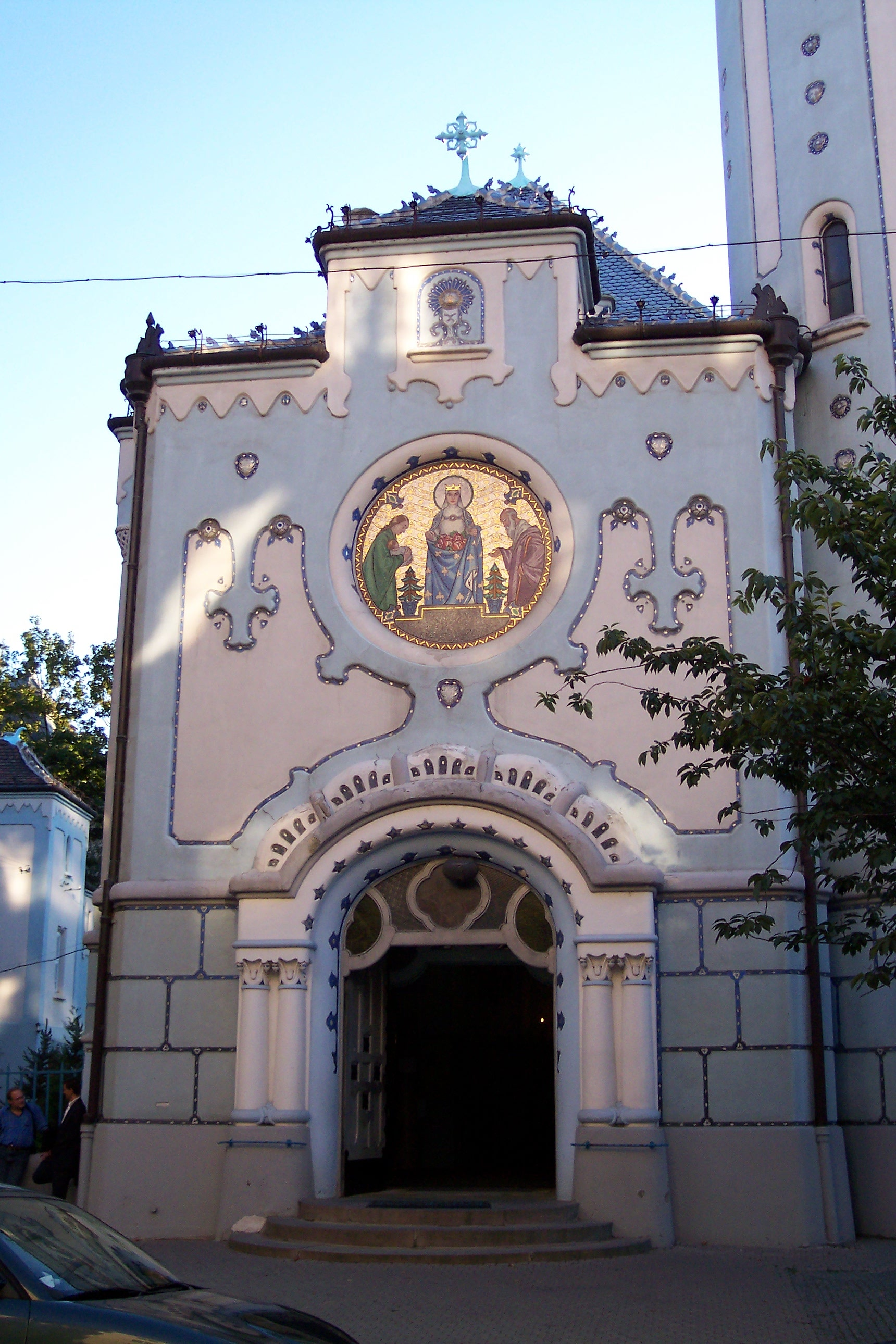 Fassade der kurzen Außenwand der Blauen Kirche in Bratislava